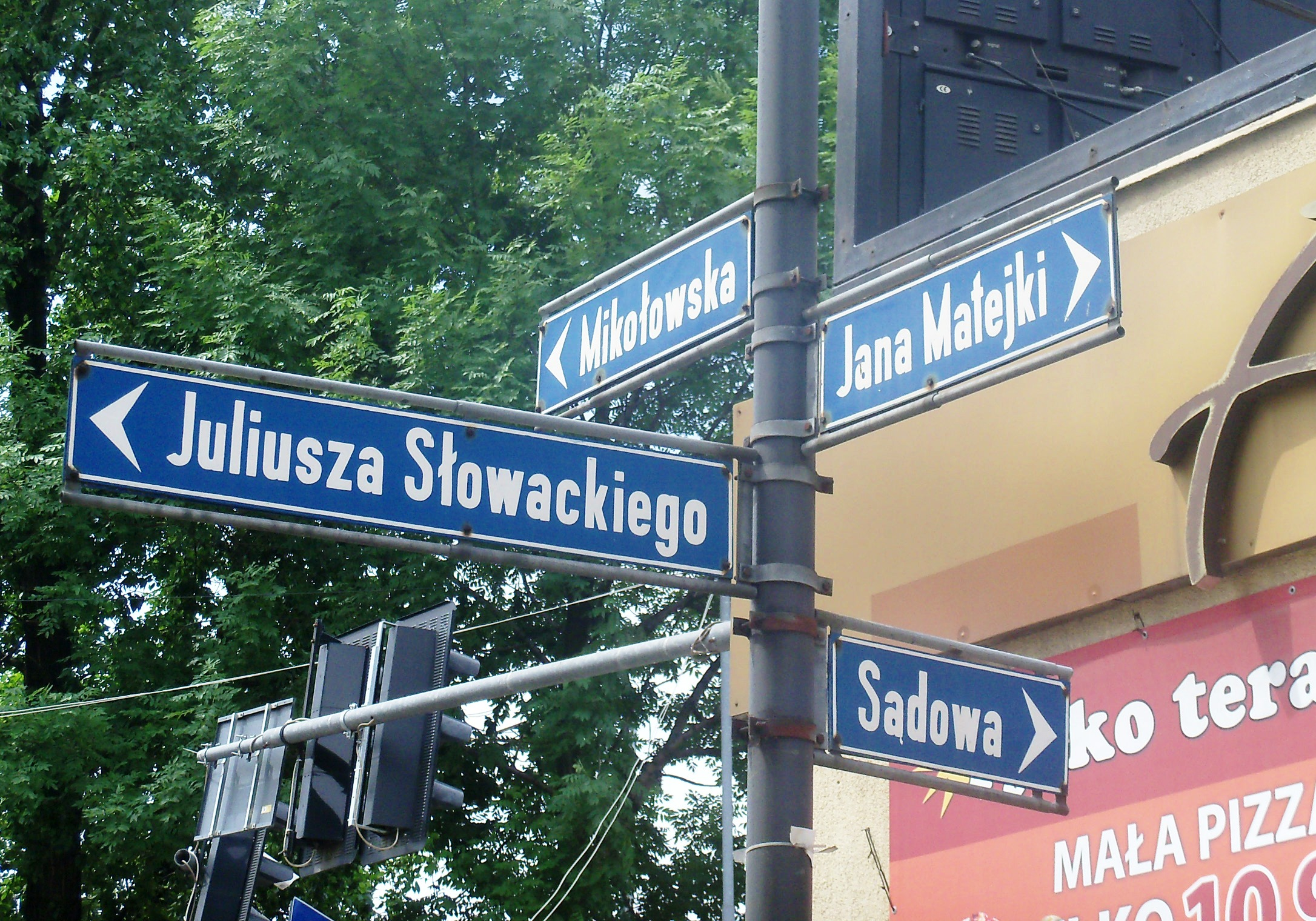 Tabliczka przy skrzyżowaniu ulic w Katowicach - ulice: Matejki, Mikołowska, Słowackiego, Sądowa